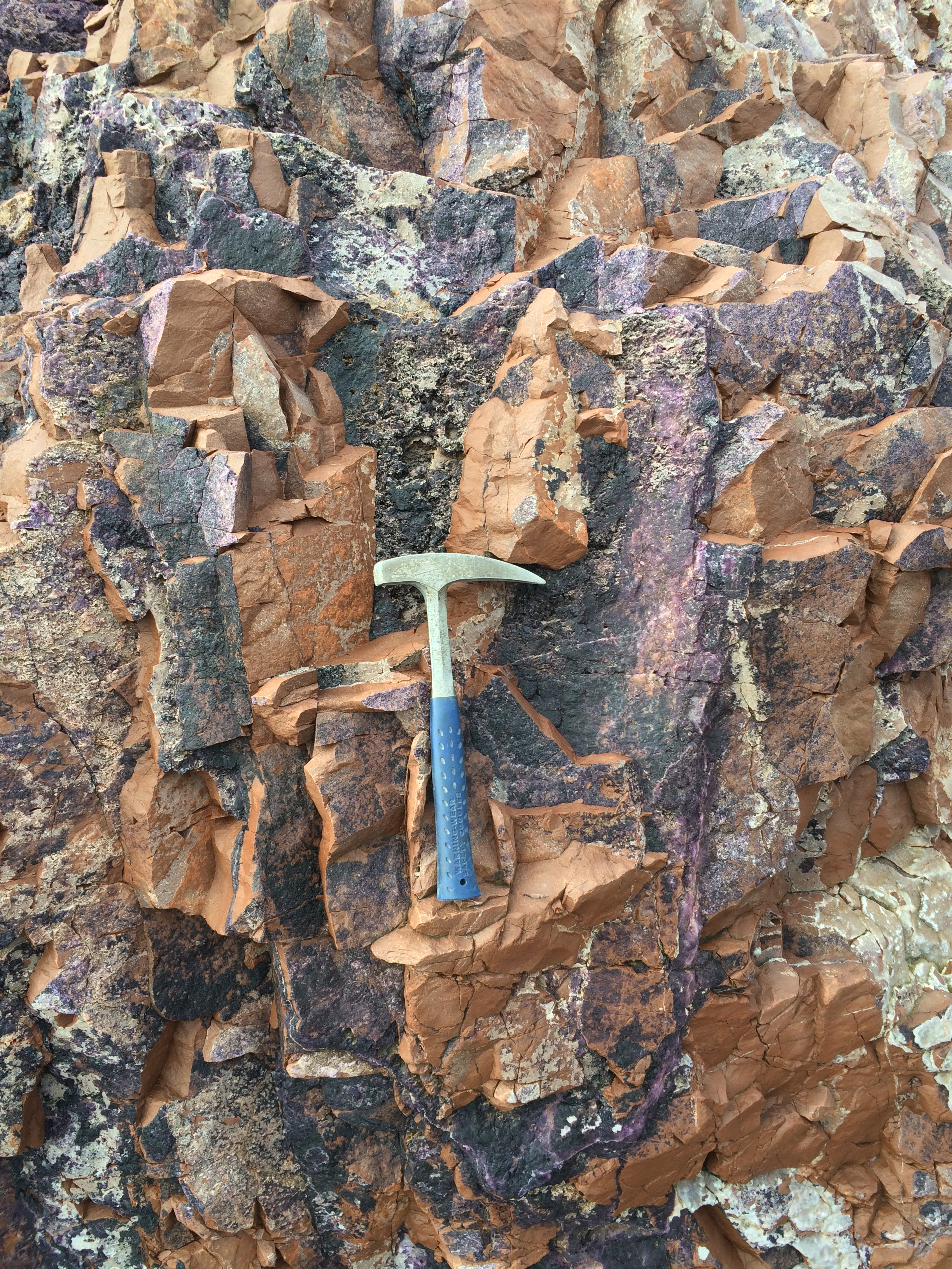 Берег Белого моря